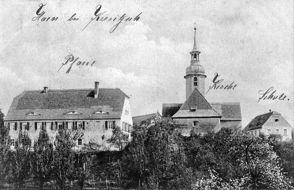 Pfarrhaus, Kirche und Schule von Hain 1907